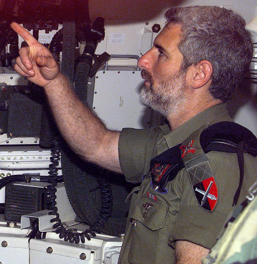 Dan Harel, Commander Israeli Defense Force Artillery